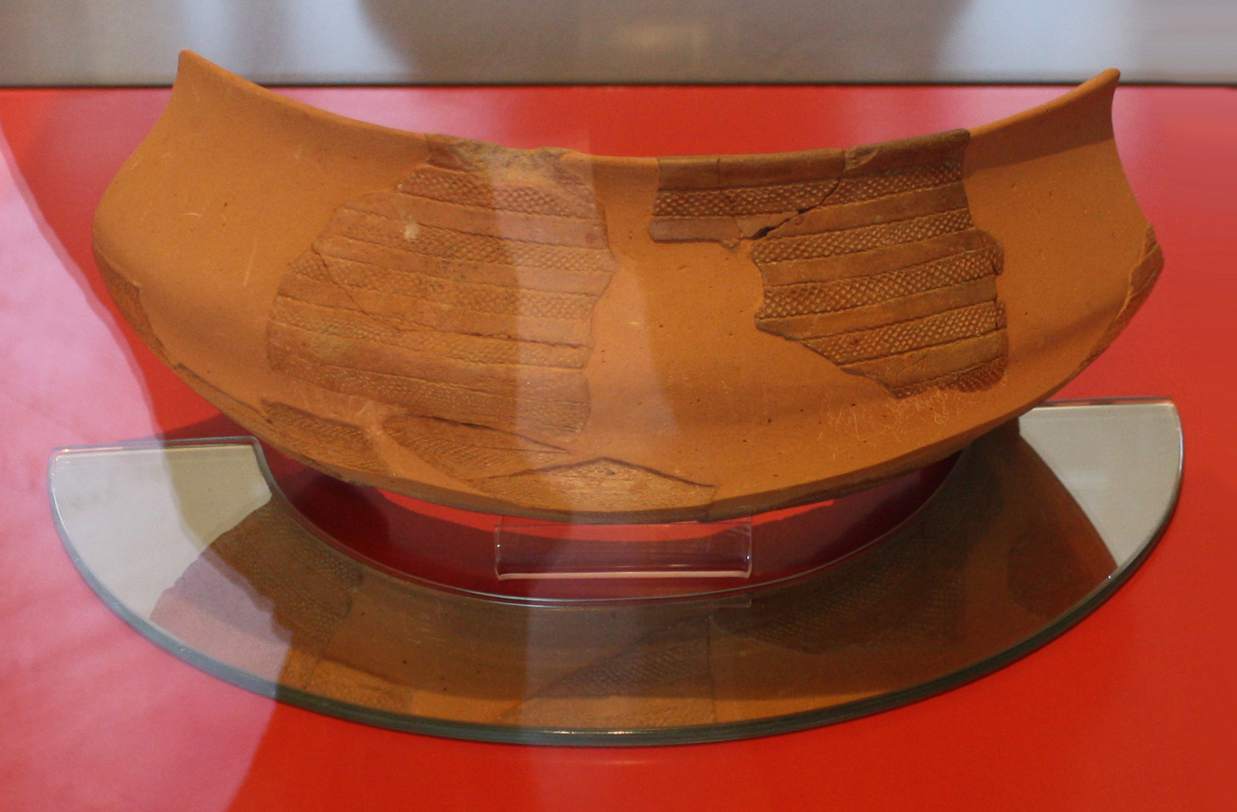 Vaso campaniforme in argilla con decorazione geometrica.